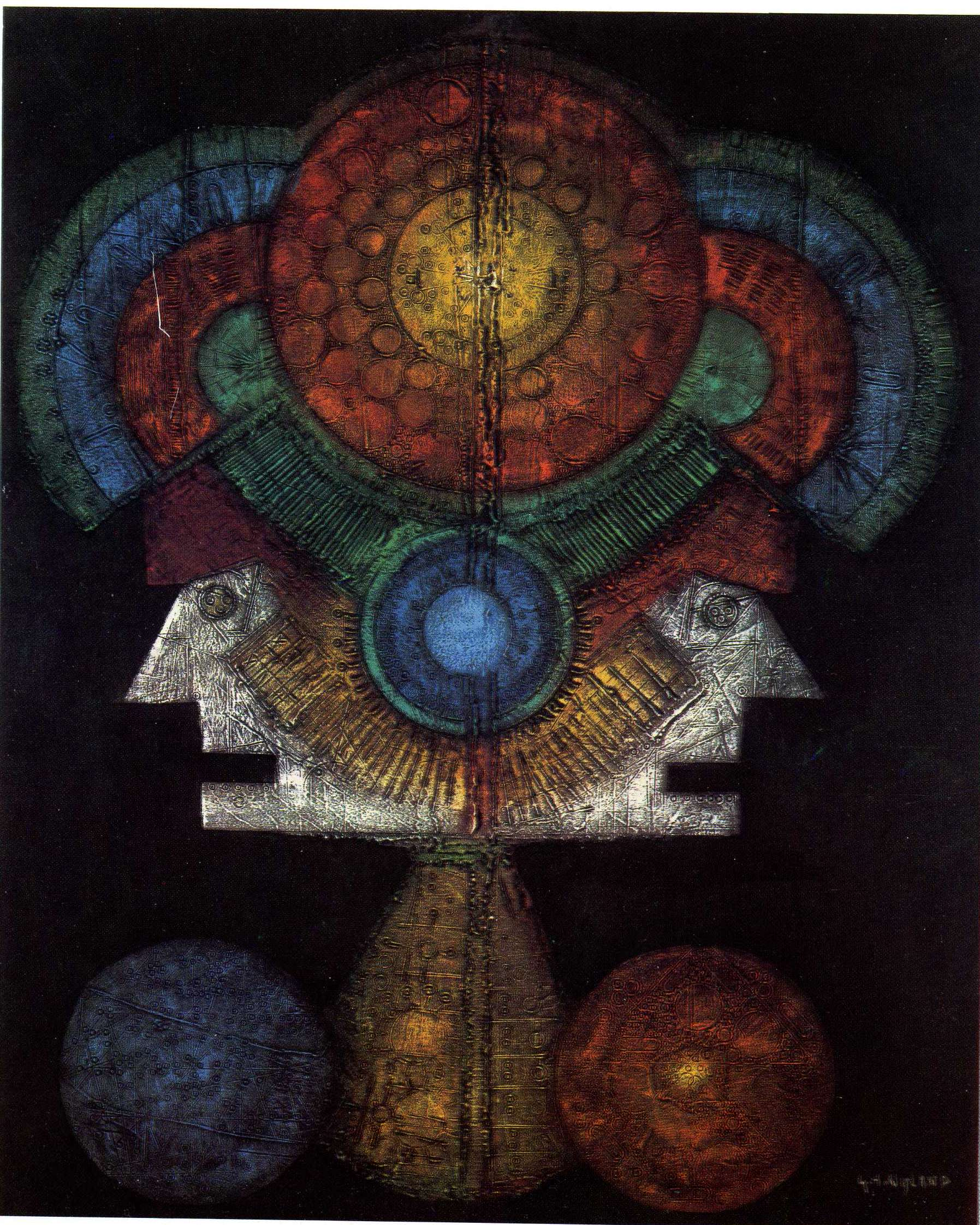 Gerrit Nijland heeft in Gemini een lijnenspel met sterk wiskundig aandoende vertekeningen gemaakt die in het centrum van het stuk tezamen komen tot een verdichting welke allerlei fantasiën oproepen.